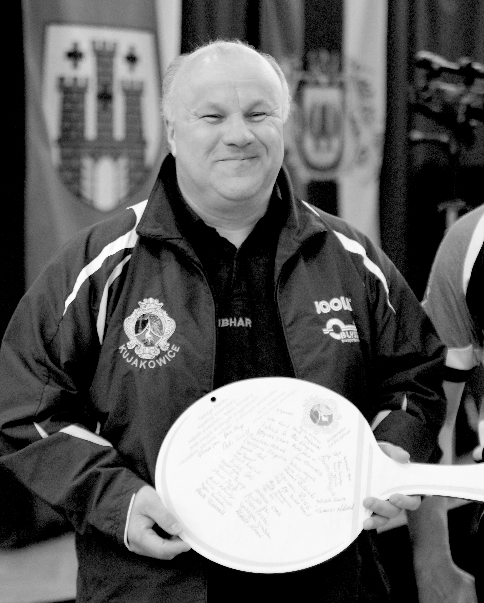 Norbert z pamiątkową paletką z okazji 50 urodzin. Chocianowice. Zawodnik LZS Blyss Kujakowice